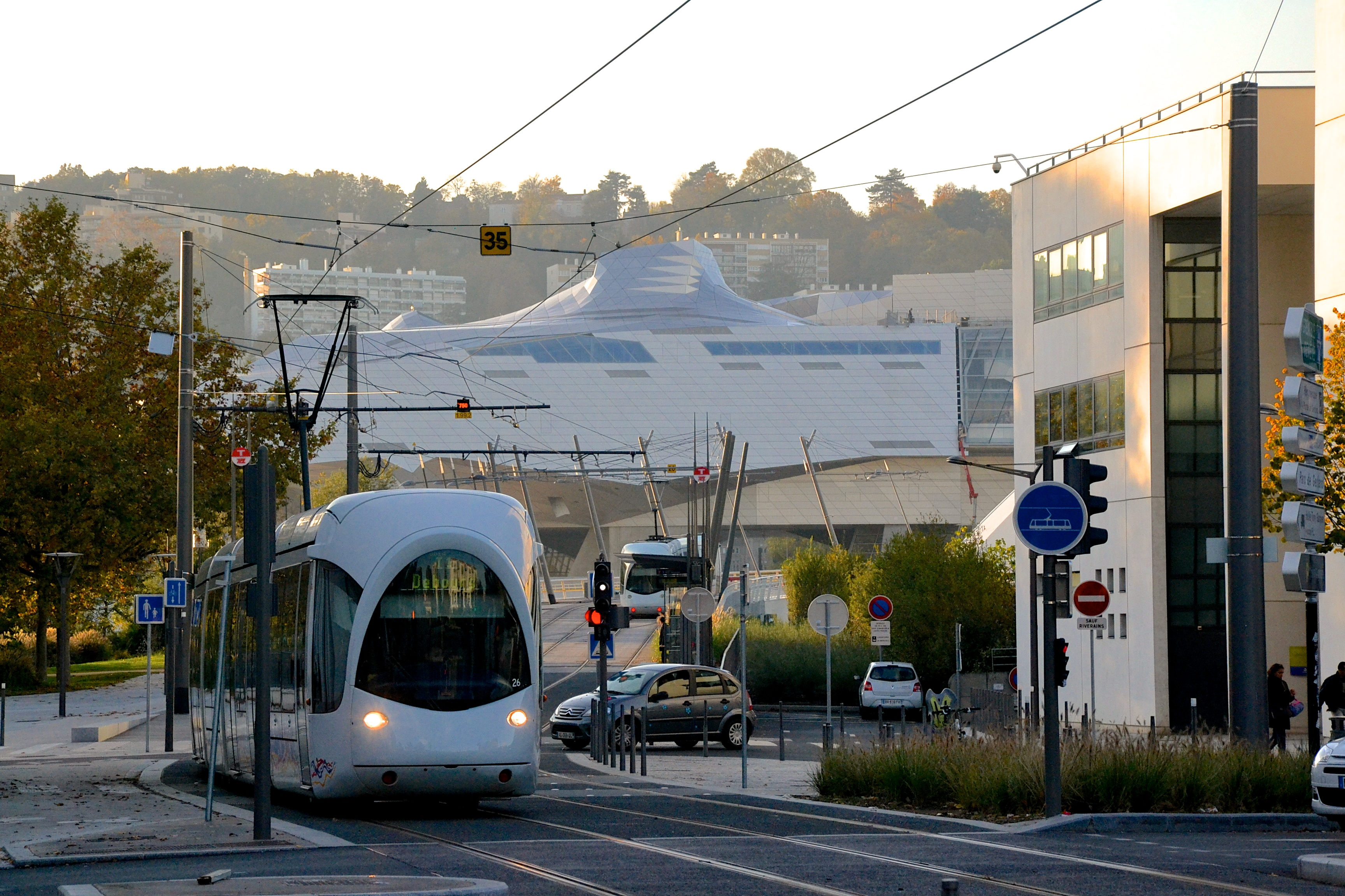 Tramway T1 à la station Halle Tony Garnier (Lyon, Rhône, France).